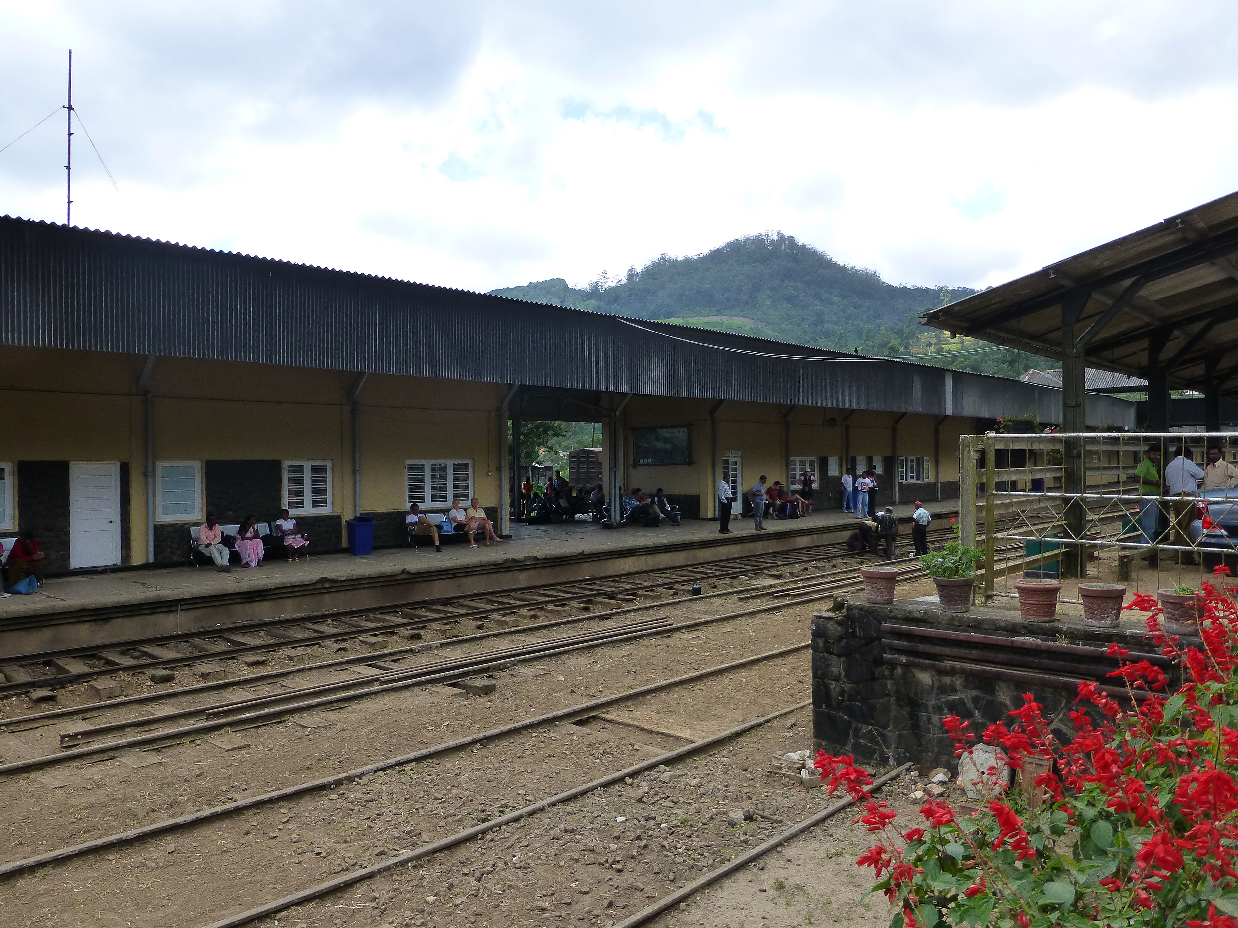 Gare de Nanu Oya (Sri Lanka)